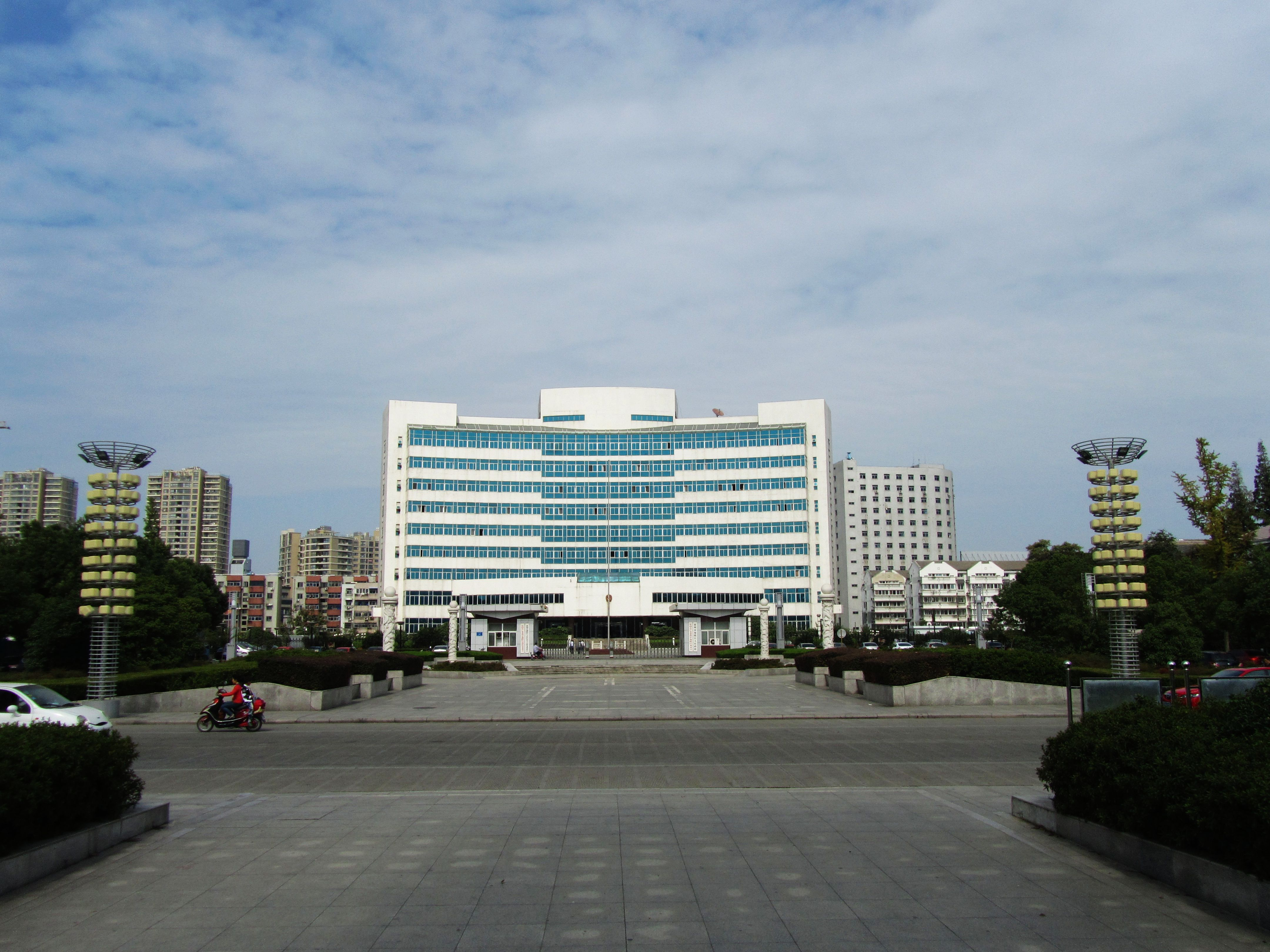 泰州市海陵区政府大楼。